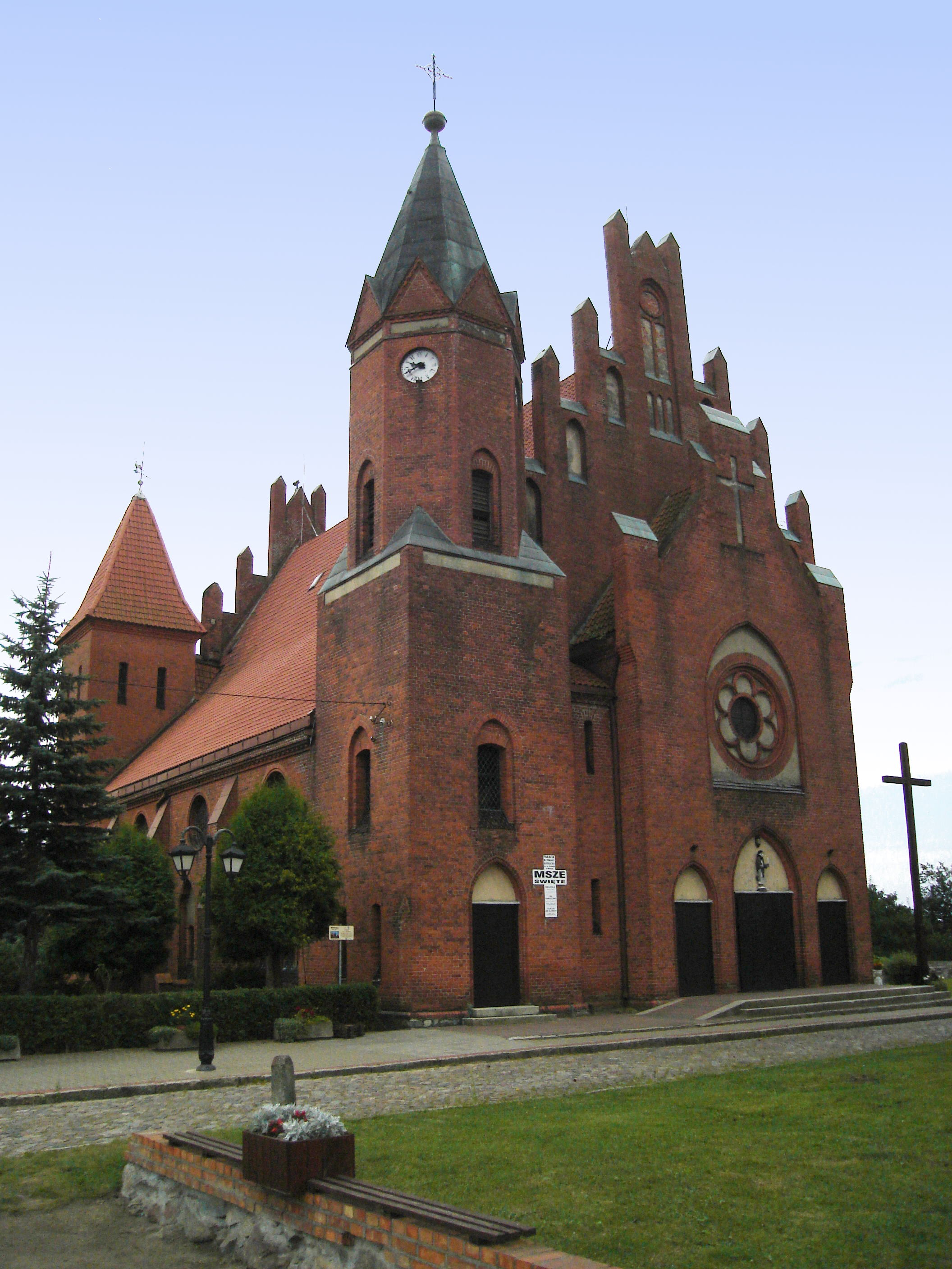 Miłomłyn - dawny kościół ewangelicki, obecnie rzymskokatolicki parafialny p.w. św. Bartłomieja, 1898-1901